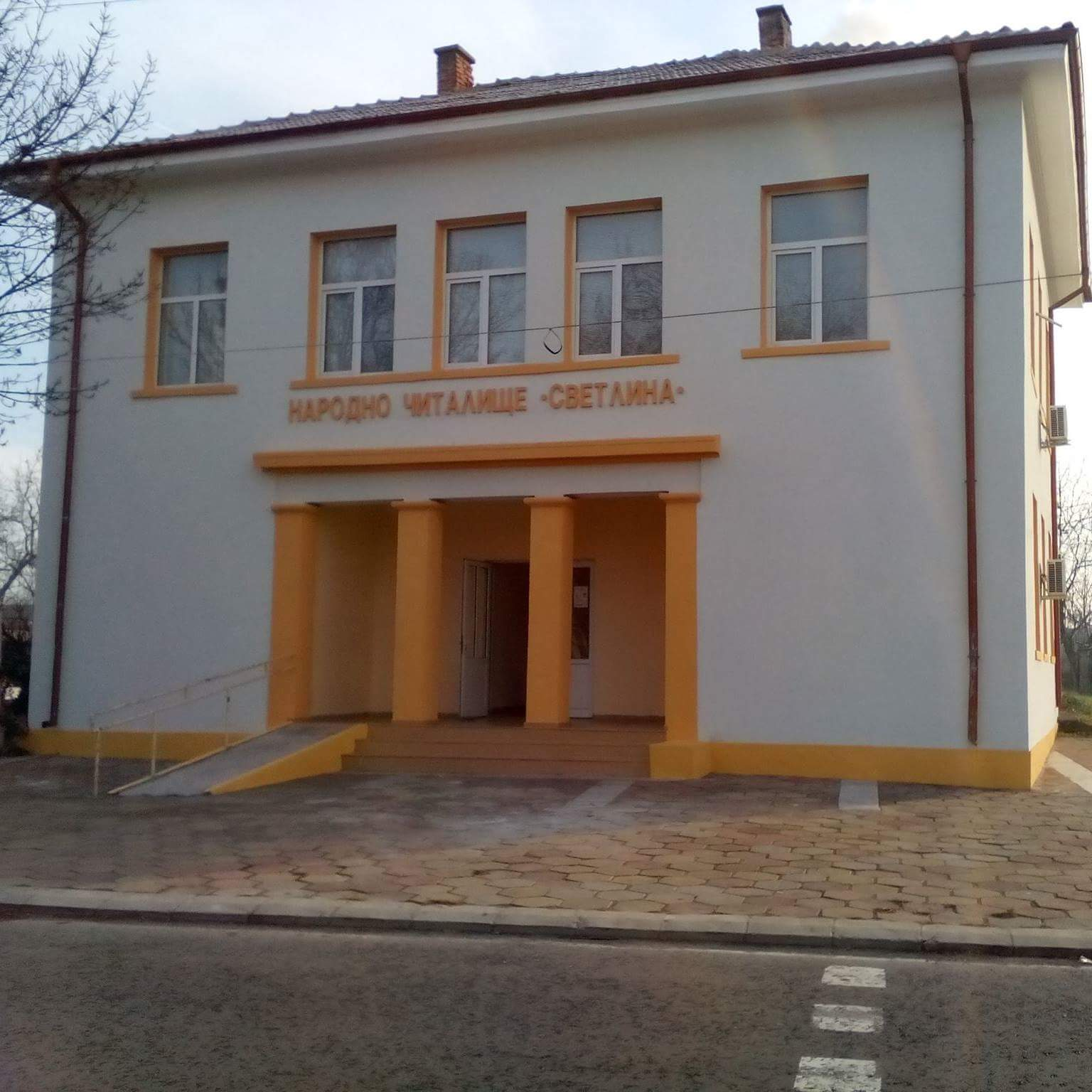 Любенова махала - читалище "Светлина 1862"